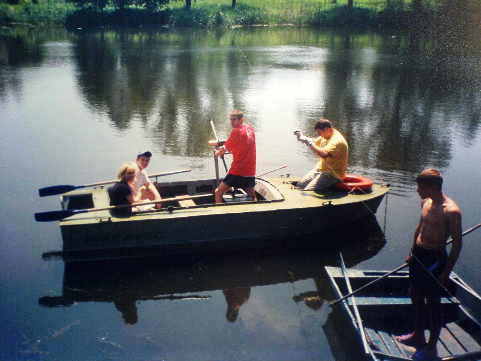 Богуславський гідролого-гідрохімічний стаціонар Київського університету. Гідрометричні роботи на Росі.